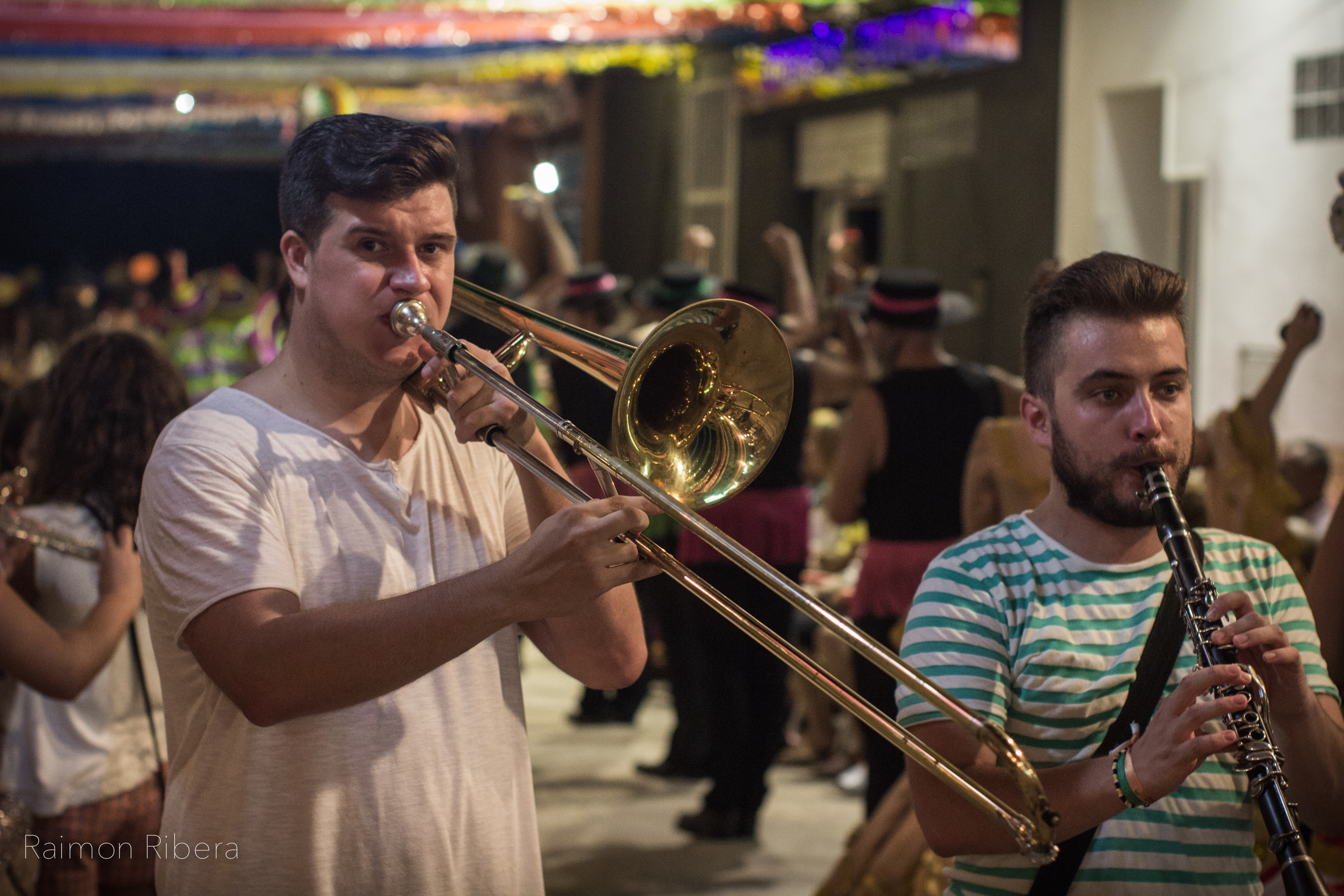 Danses de Guadassuar 2015